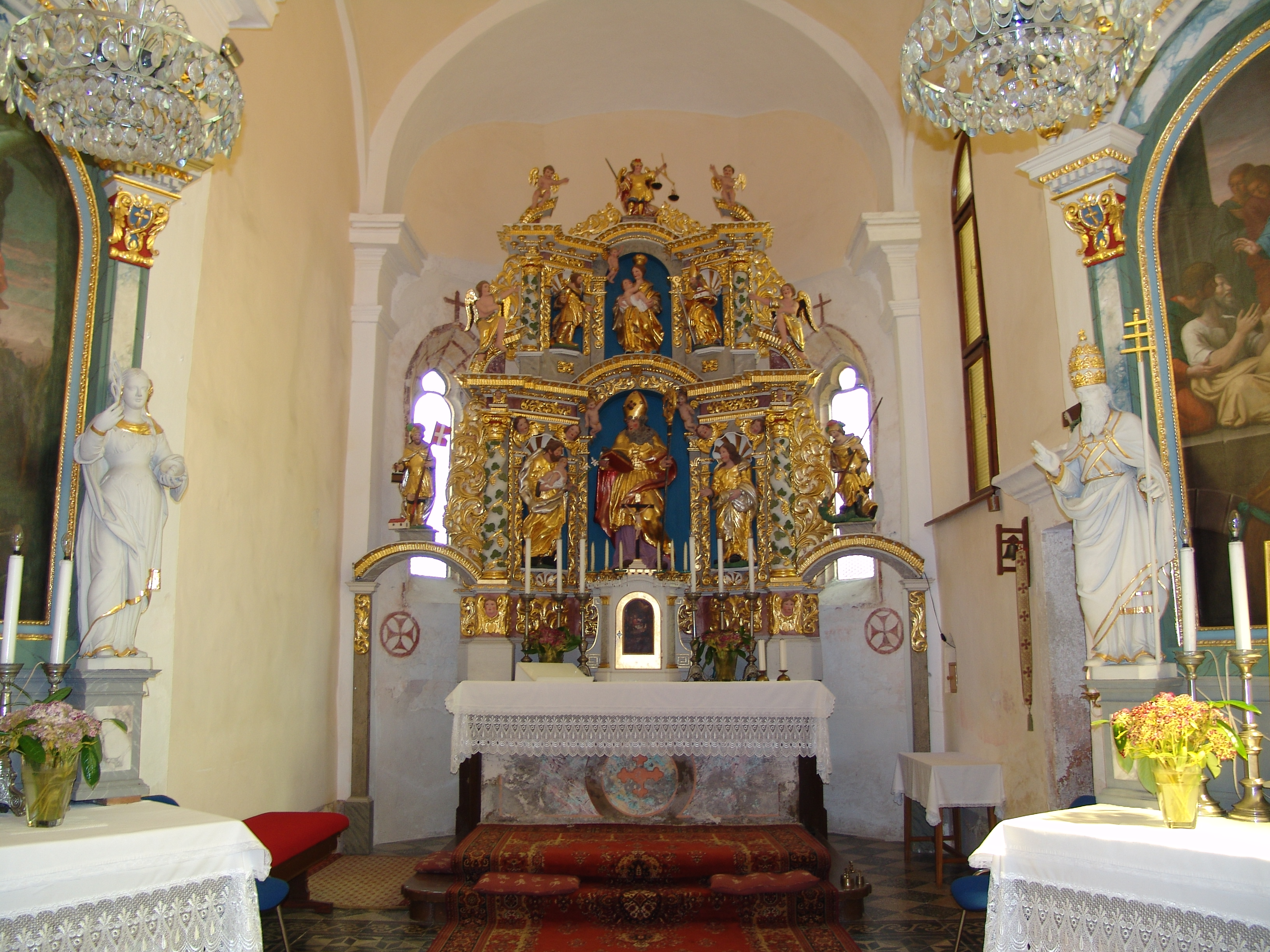 Glavni oltar sv. Urha v cerkvi sv. Urha v Hotemažah